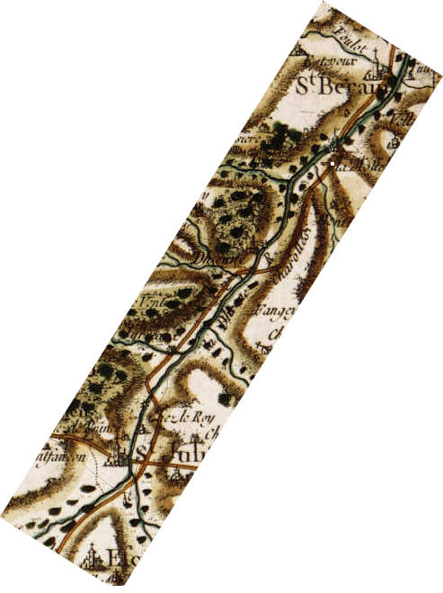 Origine : Collection personnelle Description : Dessin représentant la Dheune avant la construction du canal du centre.